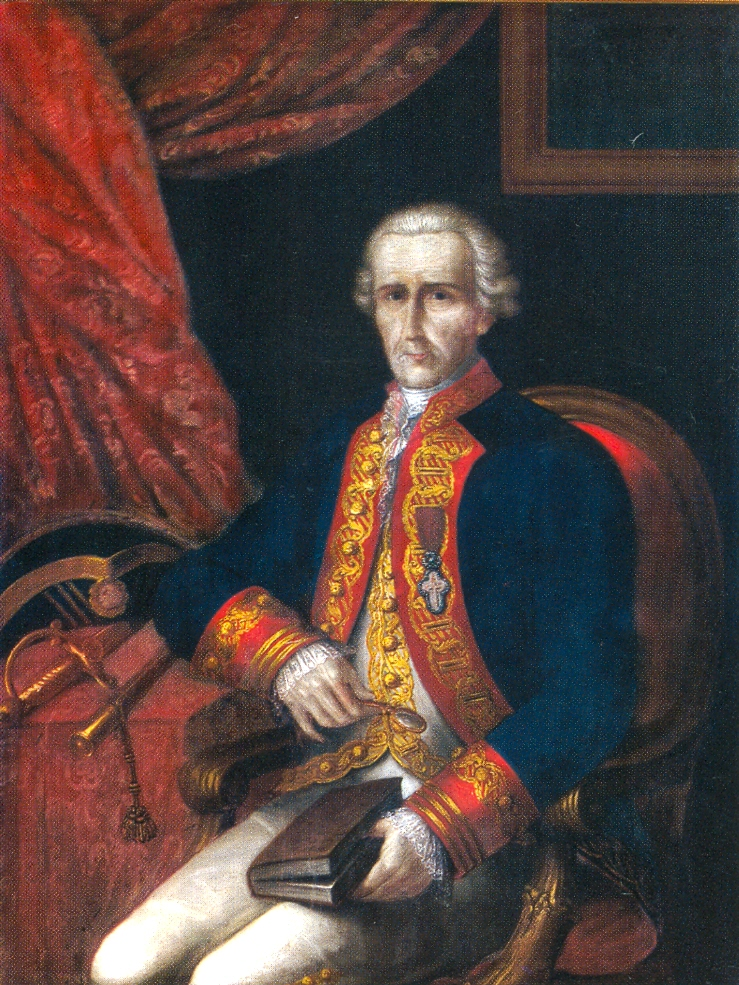 Retrato de Juan José de la Puente e Ibáñez de Segovia, V Marqués de Corpa (1724-1796))